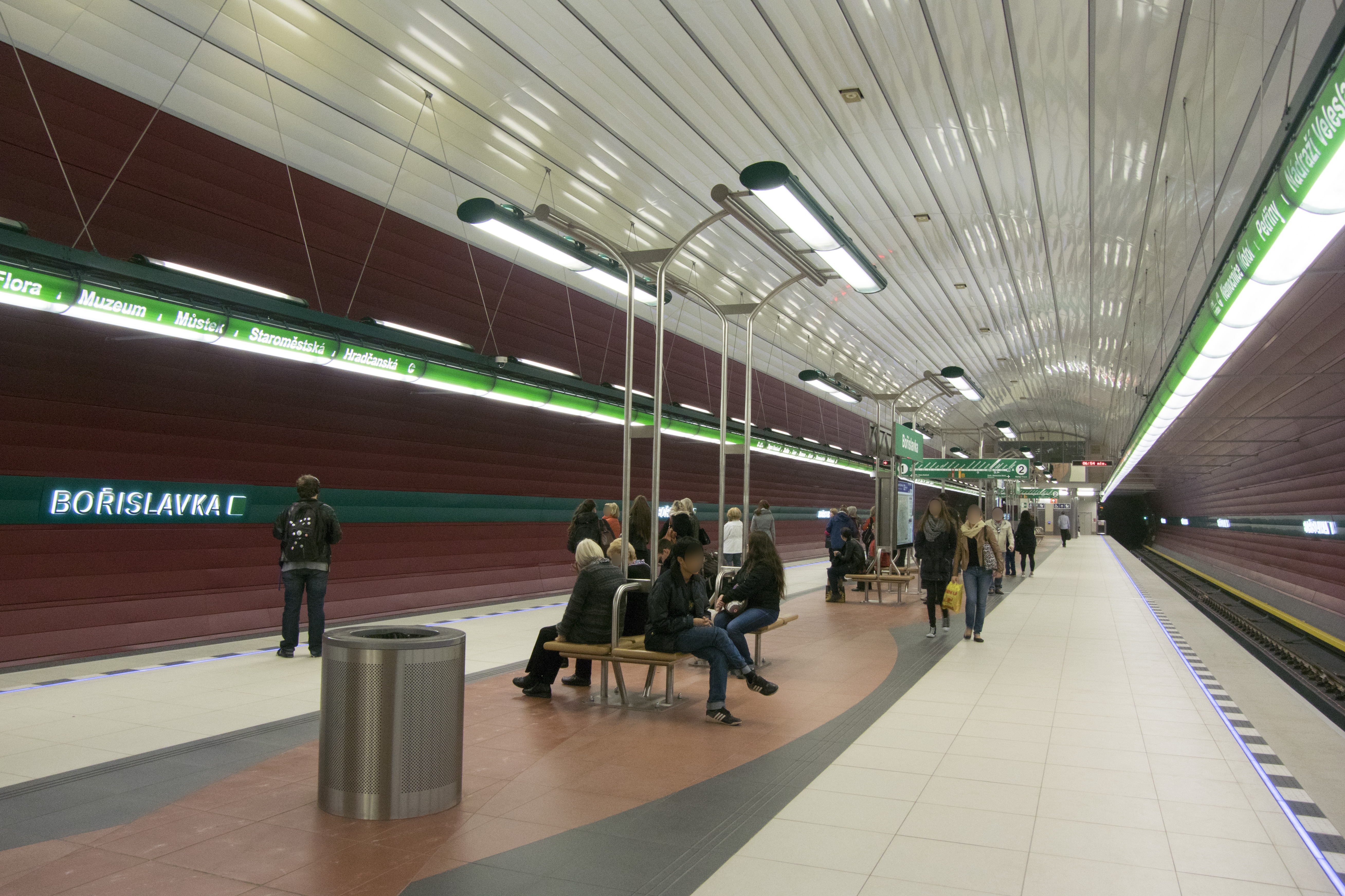 Metro trasy A - Bořislavka - 9.4.2015